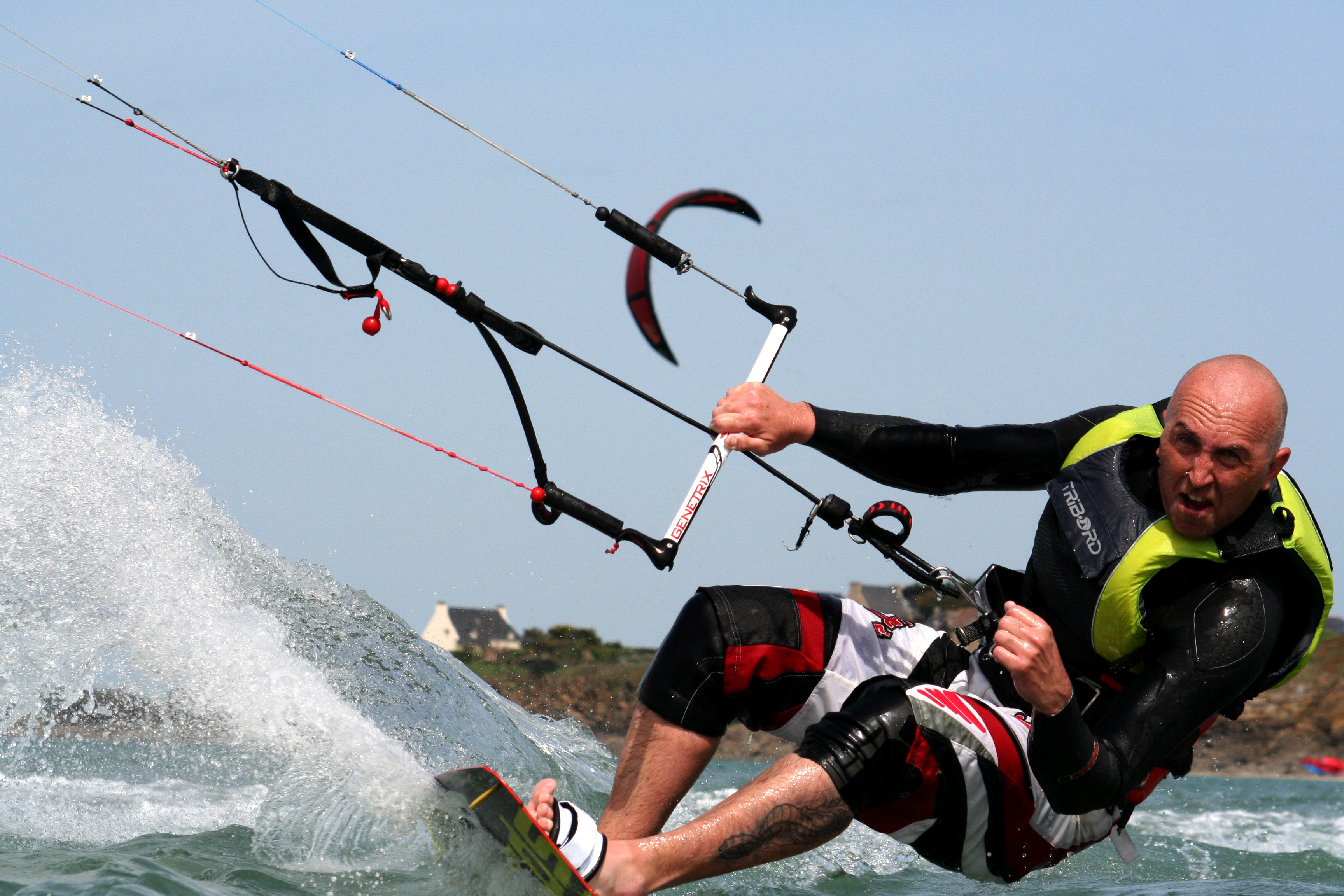 Kitesurfeur en recherche de vitesse